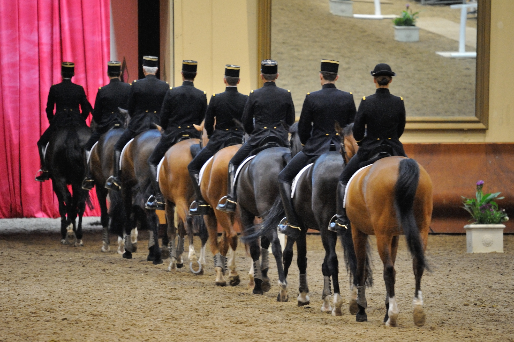 Présentation publique du Cadre noir, École nationale d'équitation, Saumur (description à compléter)